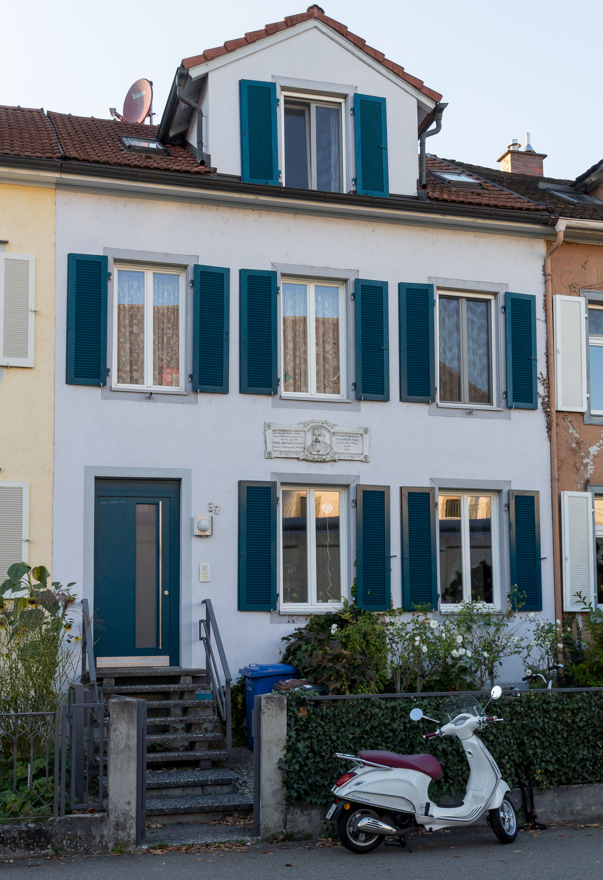 Schottenstrasse 37, das Wohnhaus von Johann Martin Schleyer in Konstanz